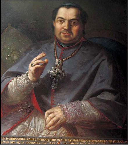 Retrato del eclesiástico español Bernardo Nadal y Crespí (1746-1818), que llegó a ser obispo de Mallorca y presidente de las Cortes de Cádiz en 1811, durante la Guerra de la Independencia Española.